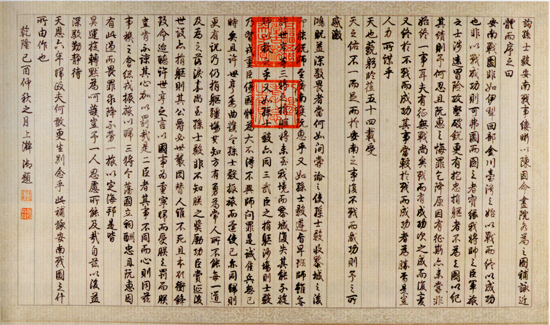 乾隆御題平定安南戰圖序